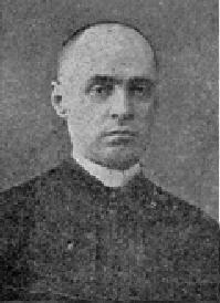 Duchowny rzymskokatolicki, członek Rady Polskiego Towarzystwa "Oświata" w Mińsku, zwolennik wprowadzenia języka białoruskiego do kościoła.